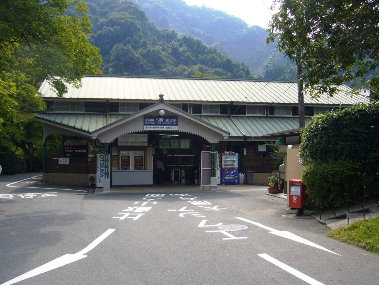 京都市左京区にある叡山電鉄叡山本線八瀬比叡山口駅駅舎。2006年の写真に比べて改札口の上の妻部の装飾が取り外されているのが目立つ。2008年10月4日に投稿者が撮影。